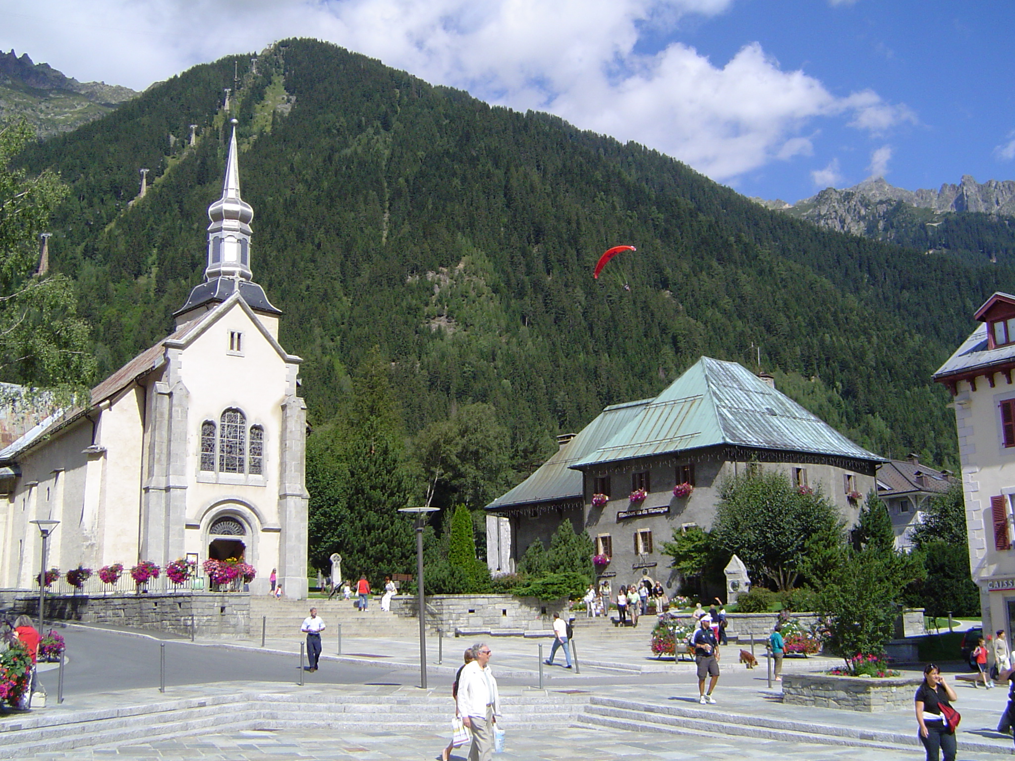 Chamonix-Mont-Blanc - L'église et la Maison de la montagne (ancien presbytère)